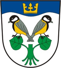 Sýkořice /okres Rakovník/